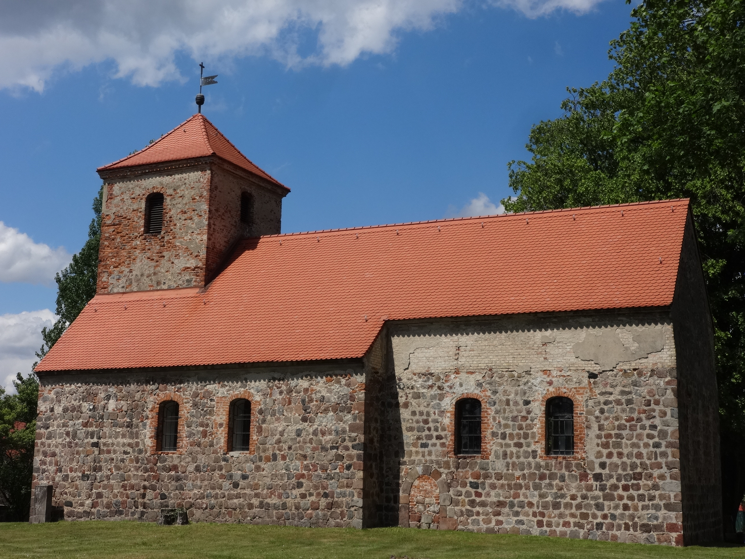 Dorfkirche Garzau, erbaut im 13. Jahrhundert und im 30-jährigen Krieg zerstört. Neuaufbau 1724.